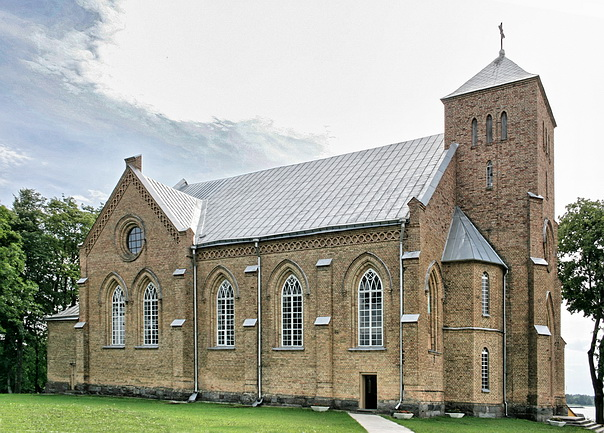 Veprių bažnyčios vakarinis fasadas